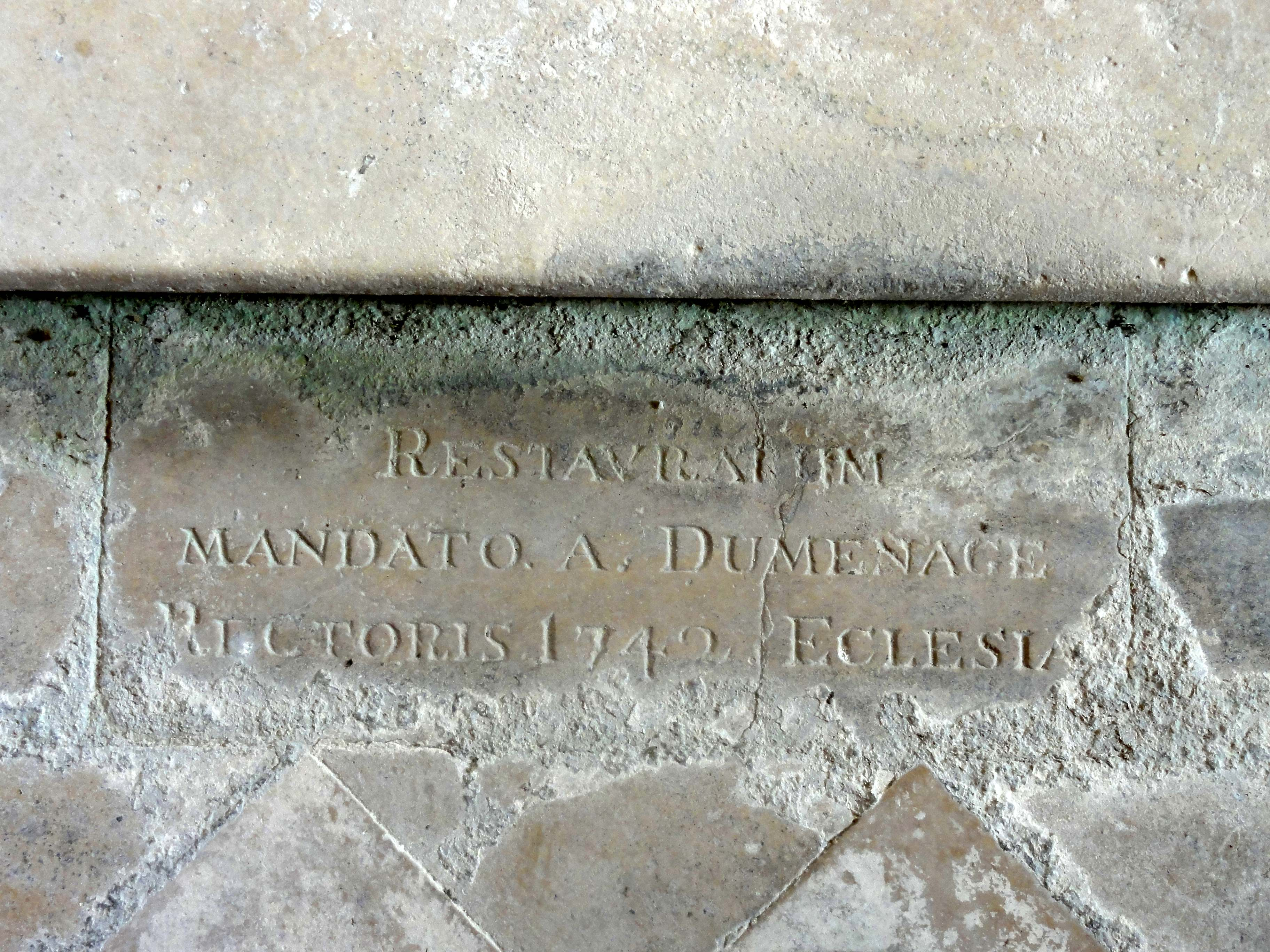 Abside, pierre commémorative de la restauration en 1742, devant l'autel.